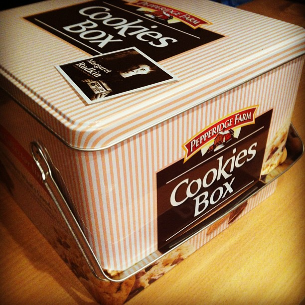 La cookie box de Pepperidge Farm avec 4 boites de cookies dedans !!